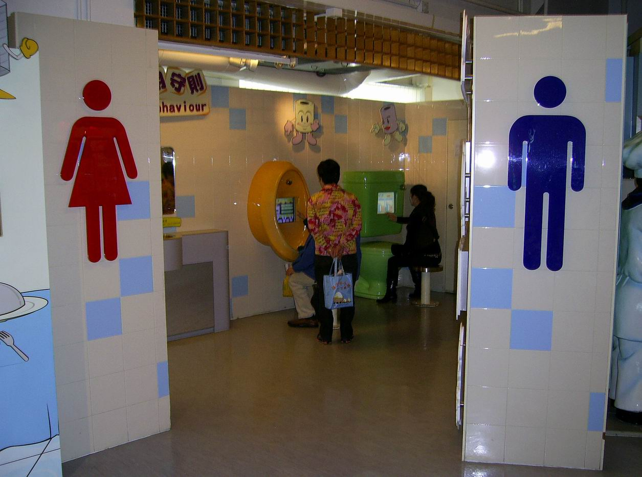 中文（香港）: 衛生教育展覽及資料中心「公廁的特色」展覽